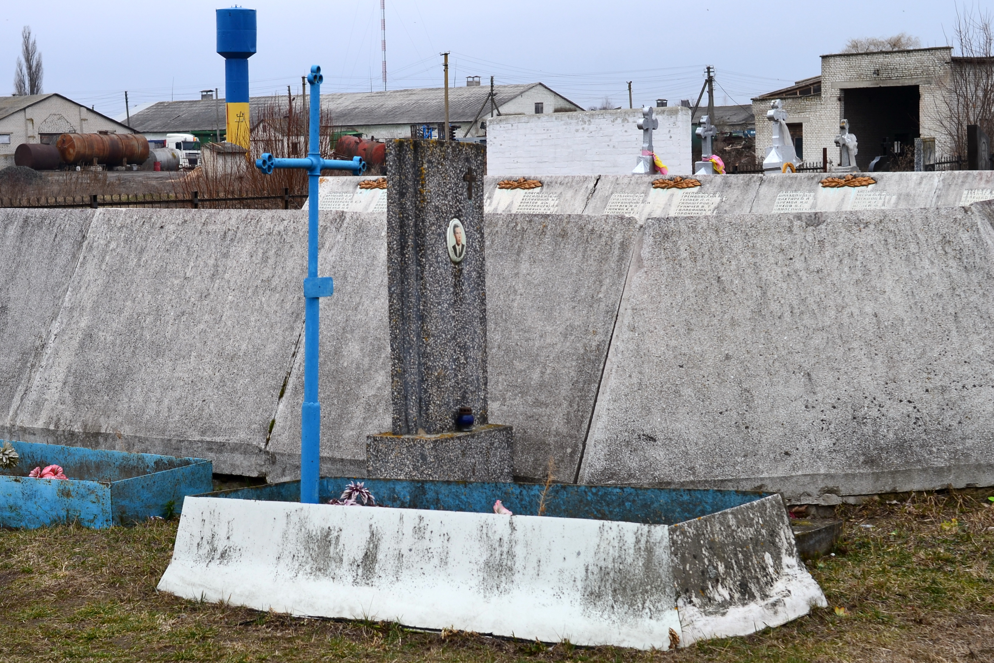 Могила старшого лейтенанта Торопова (1991 рік) - загальний вигляд - Любитів (на кладовищі) Ковельський район Волинська область Україна